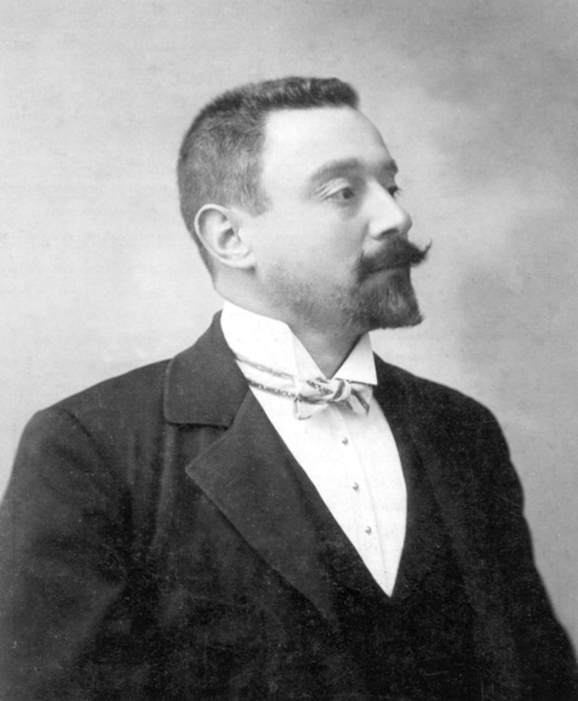 Silvestro Valenti (1865-1916)